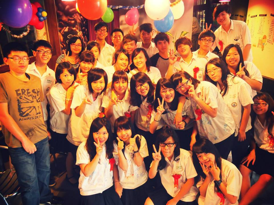 林園高中第一屆畢業舞會合影